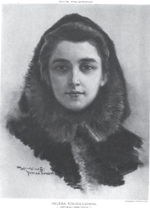 Helena Kurcewiczówna